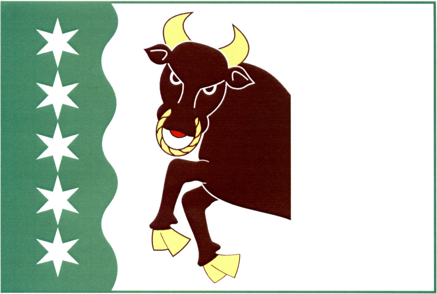 Vlajka obce Dřenice